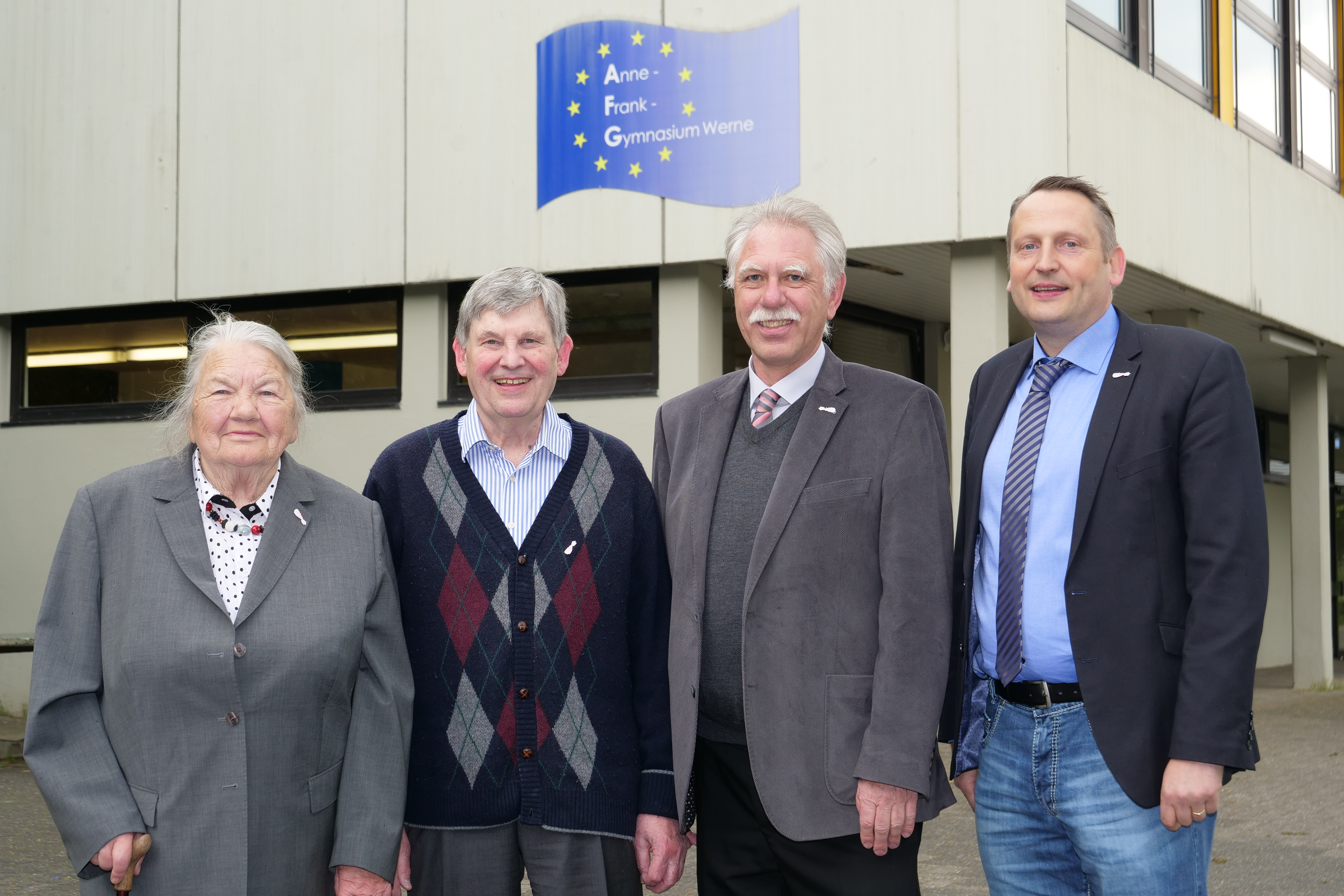 Die vier Schulleitungen des AFG